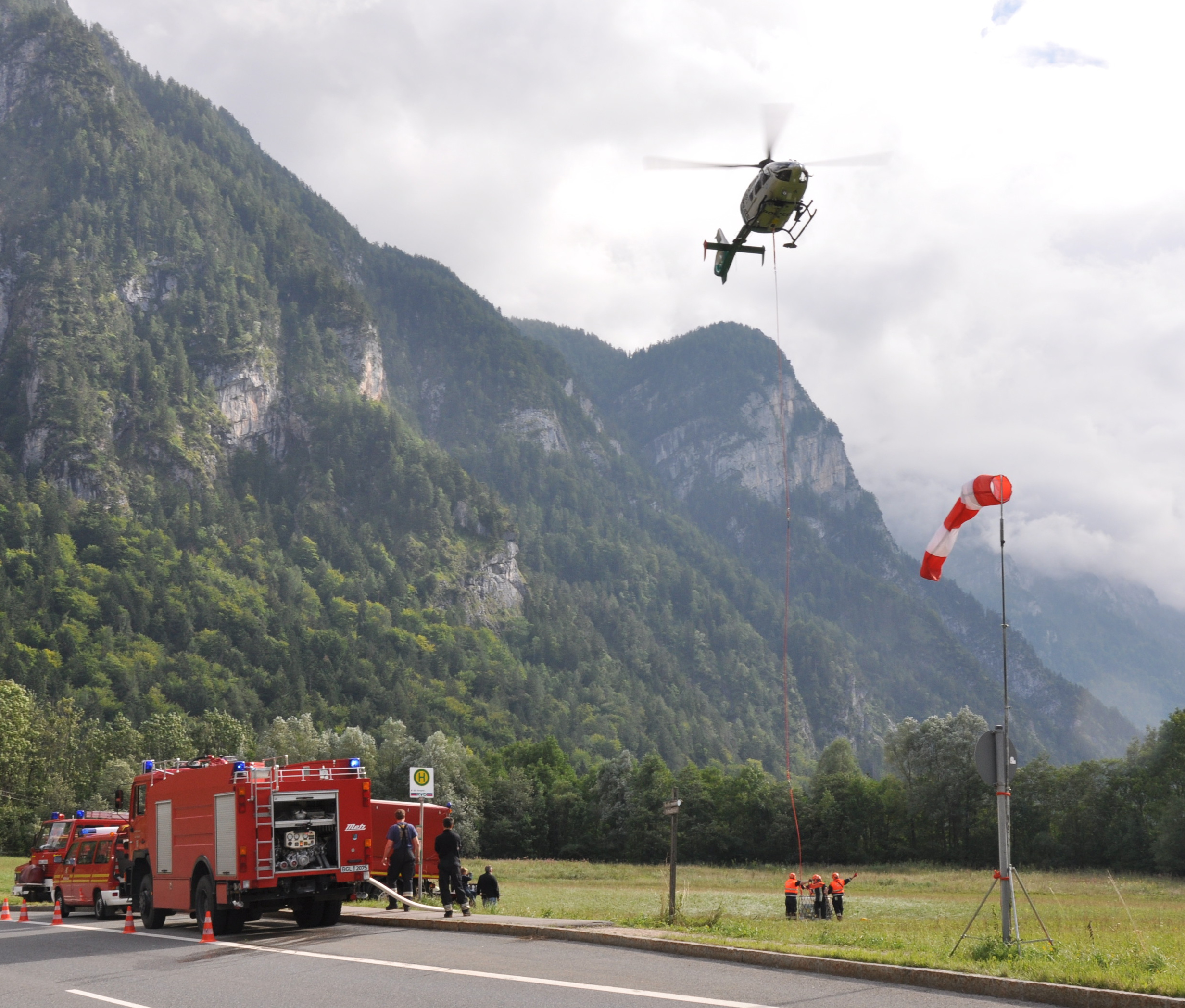 Mobiler Windsack an einem Verkehrsschild in Baumgarten. Polizeihubschrauber und Feuerwehr bekämpfen einen Waldbrand im Lattengebirge.